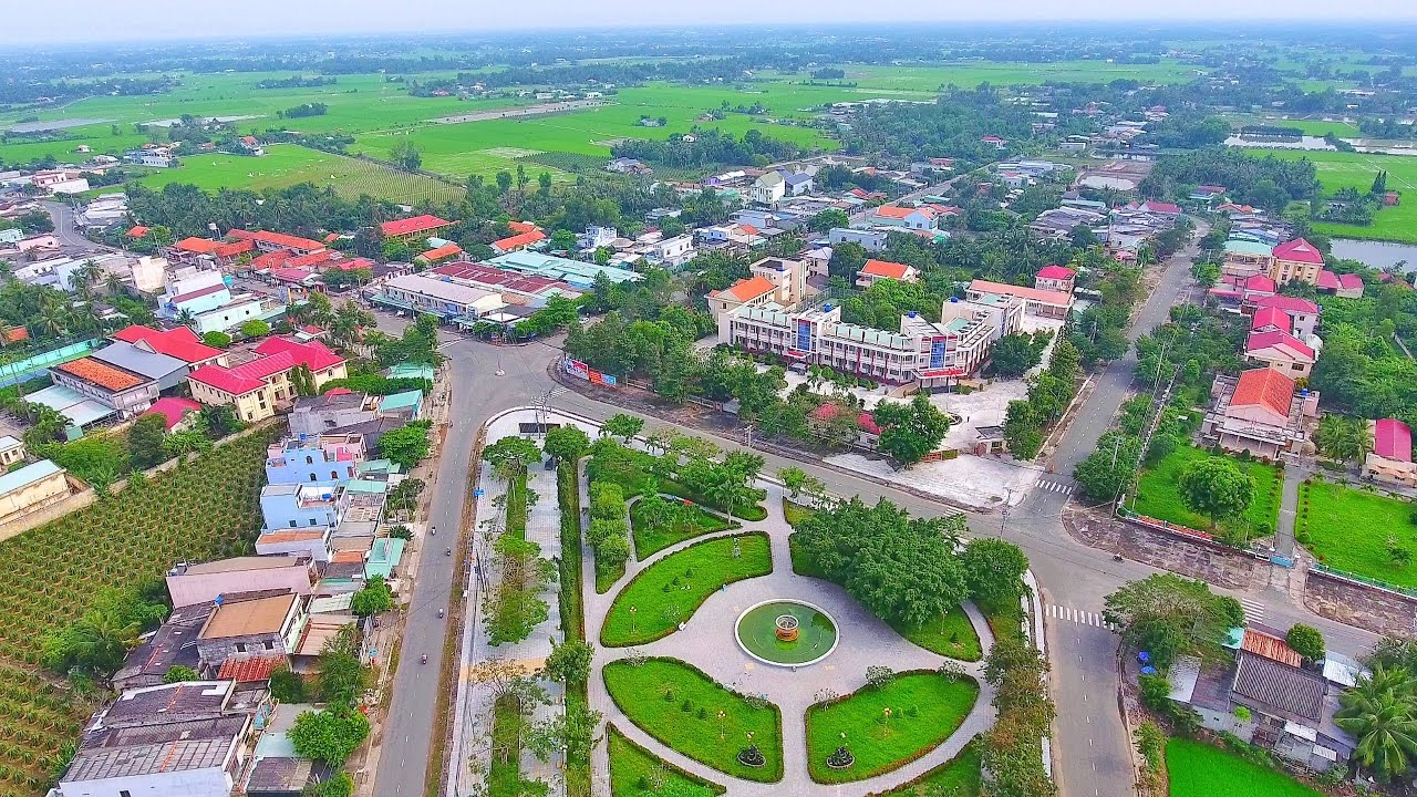 Thị trấn Tân Trụ nhìn từ trên cao